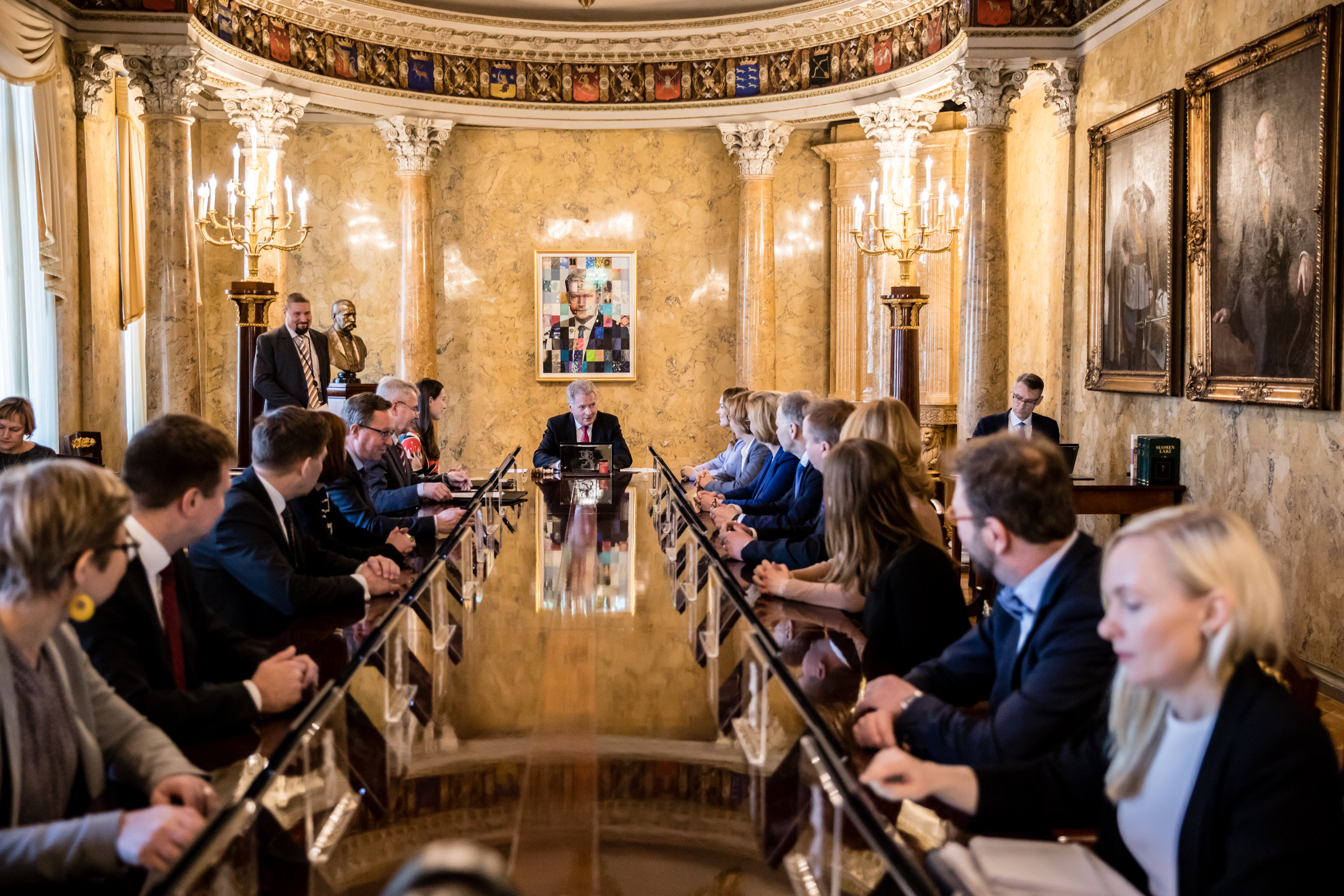 © Laura Kotila | valtioneuvoston kanslia